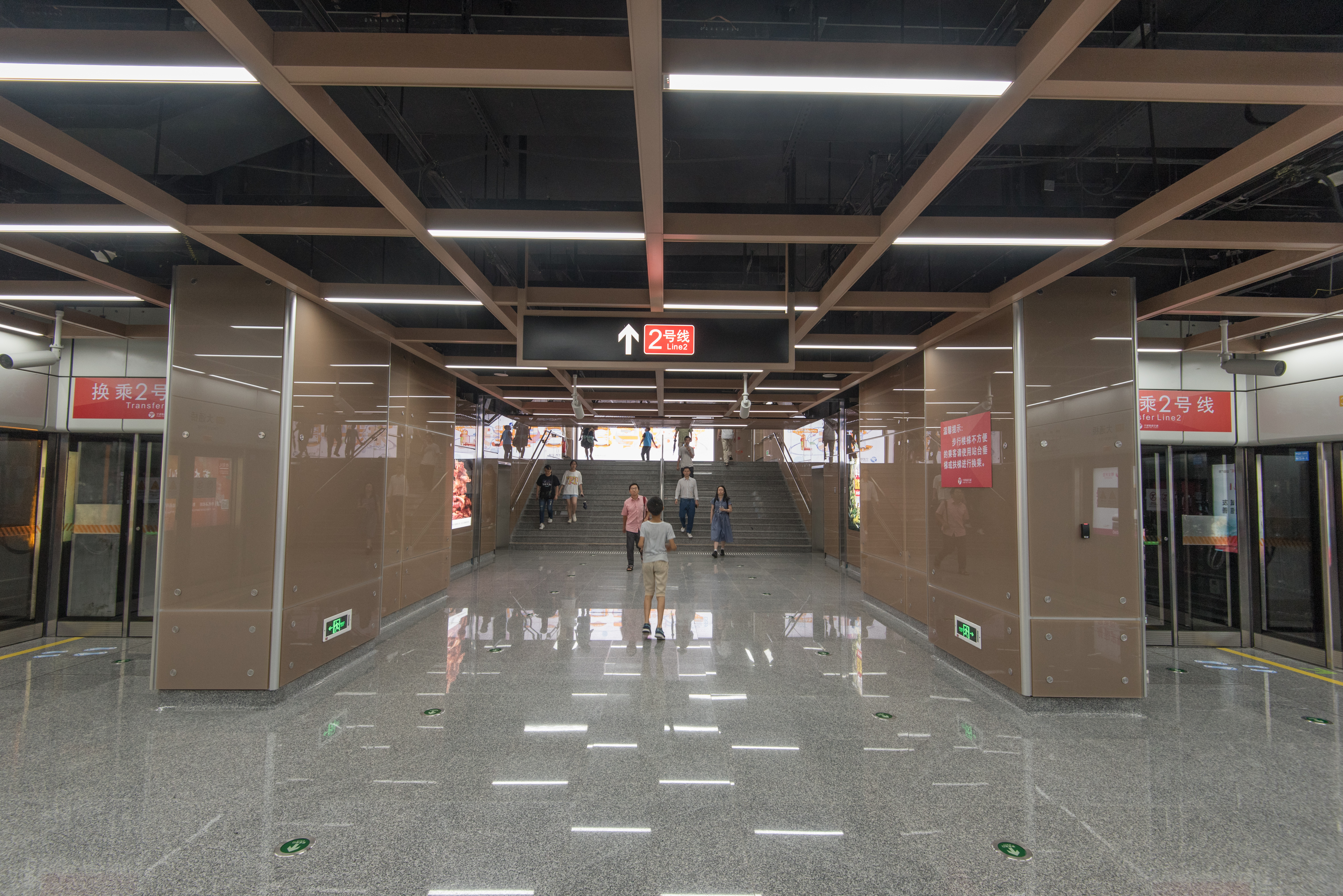 宁波地铁大通桥站